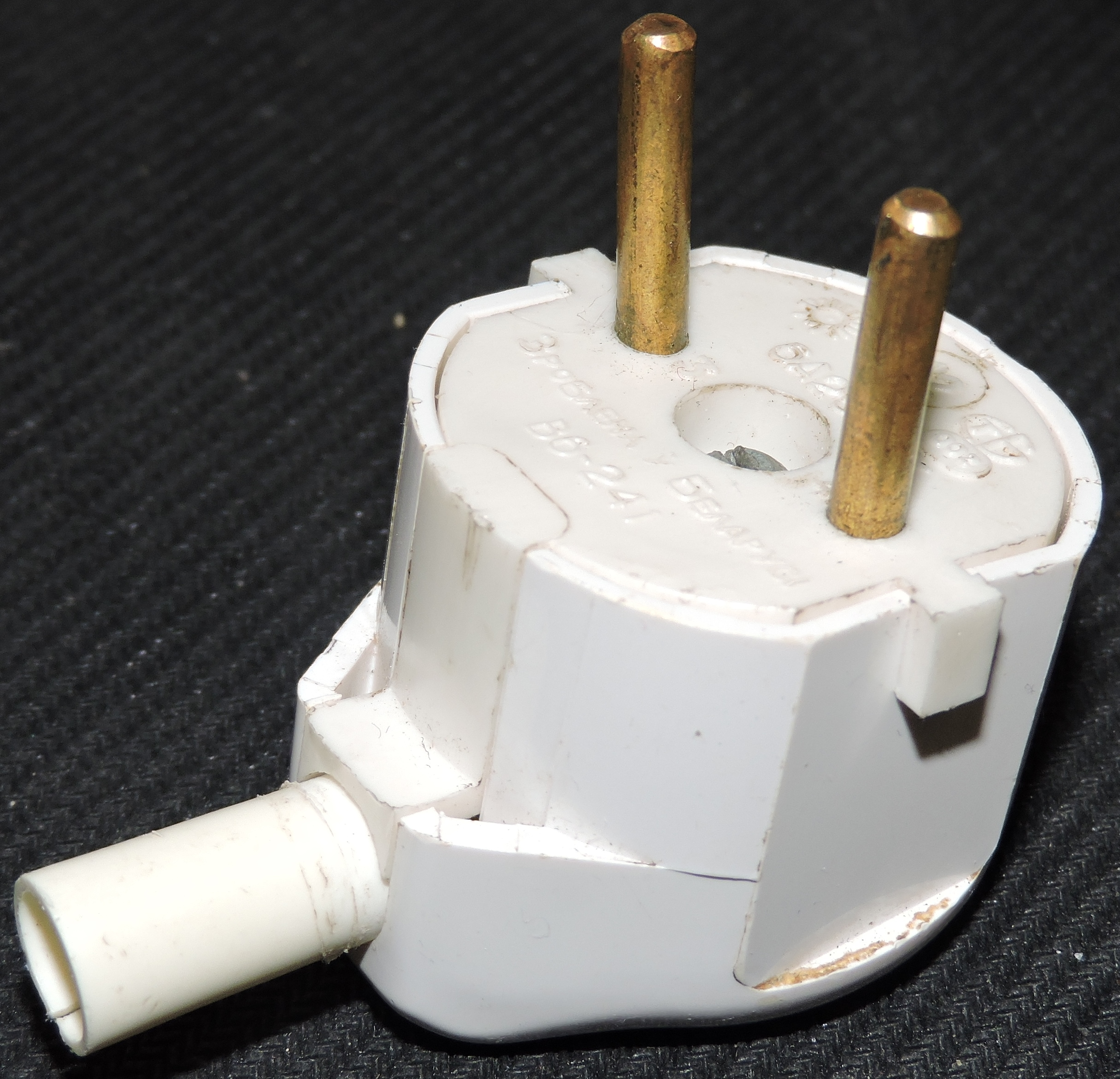 Штепсельная вилка В6-241. Рассчитана на ток силой 6 А и напряжением 250 В. Совместима для использования с розетками типа Schuko, правда, вставка в гнёзда со скобами заземления несколько проблематична из-за отсутствия прорезей на корпусе